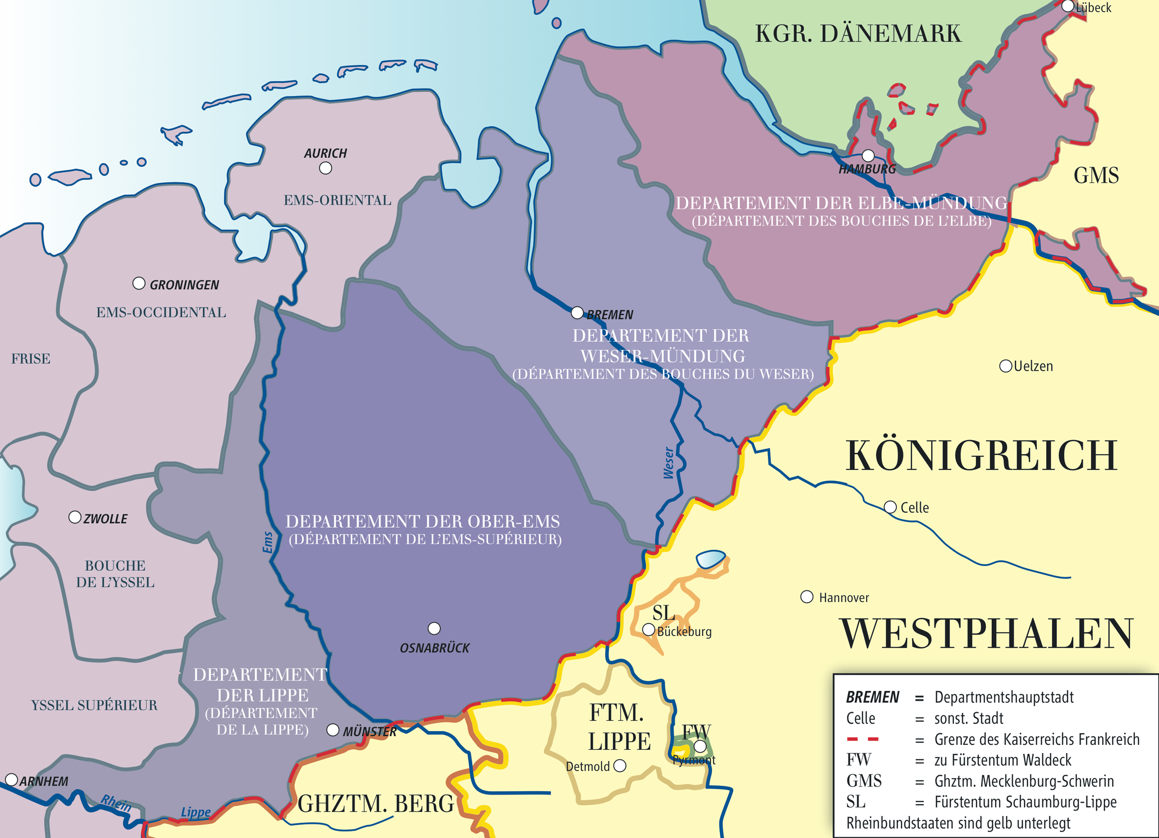 Karte der Hanseatischen Departments (1812)